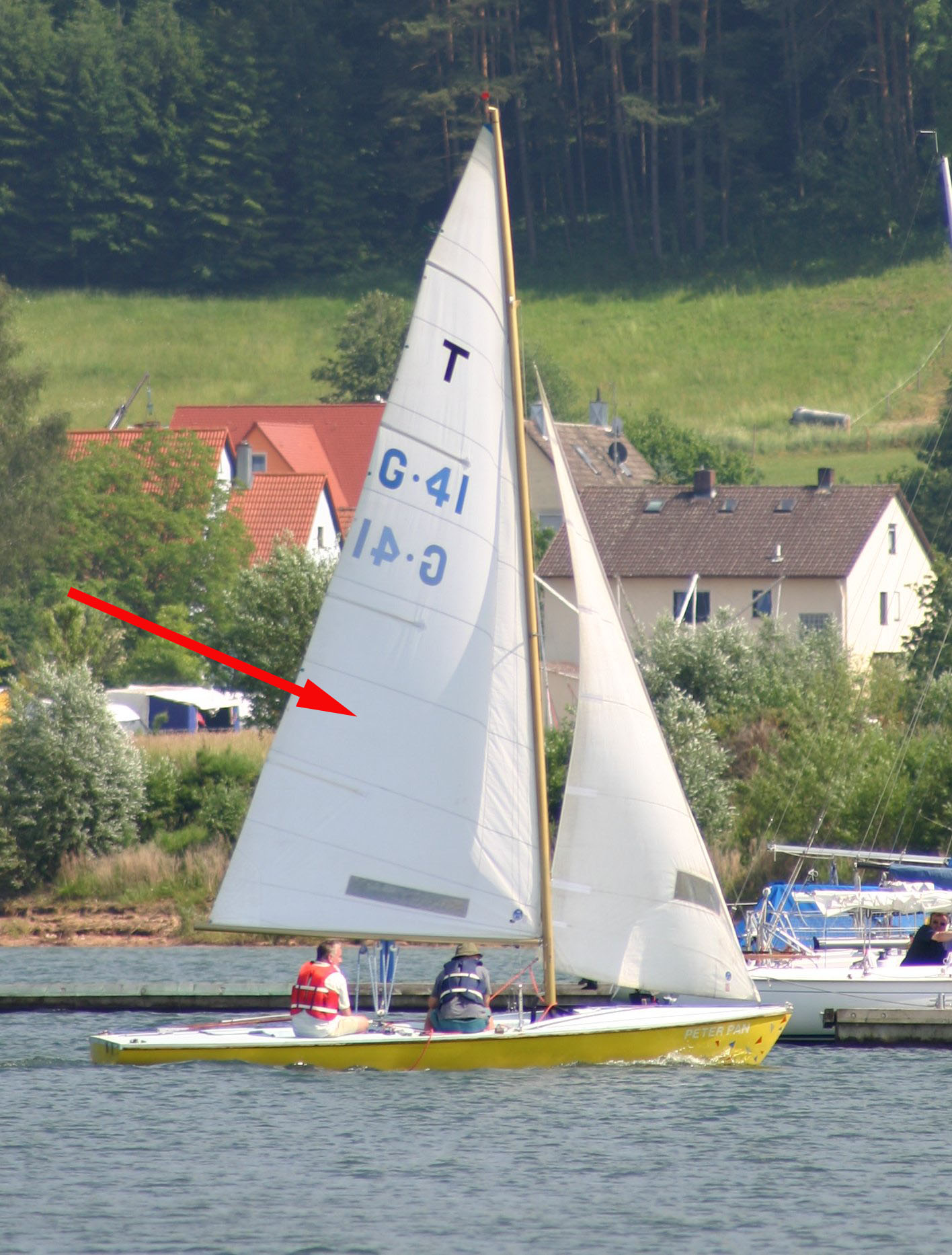 Großsegel